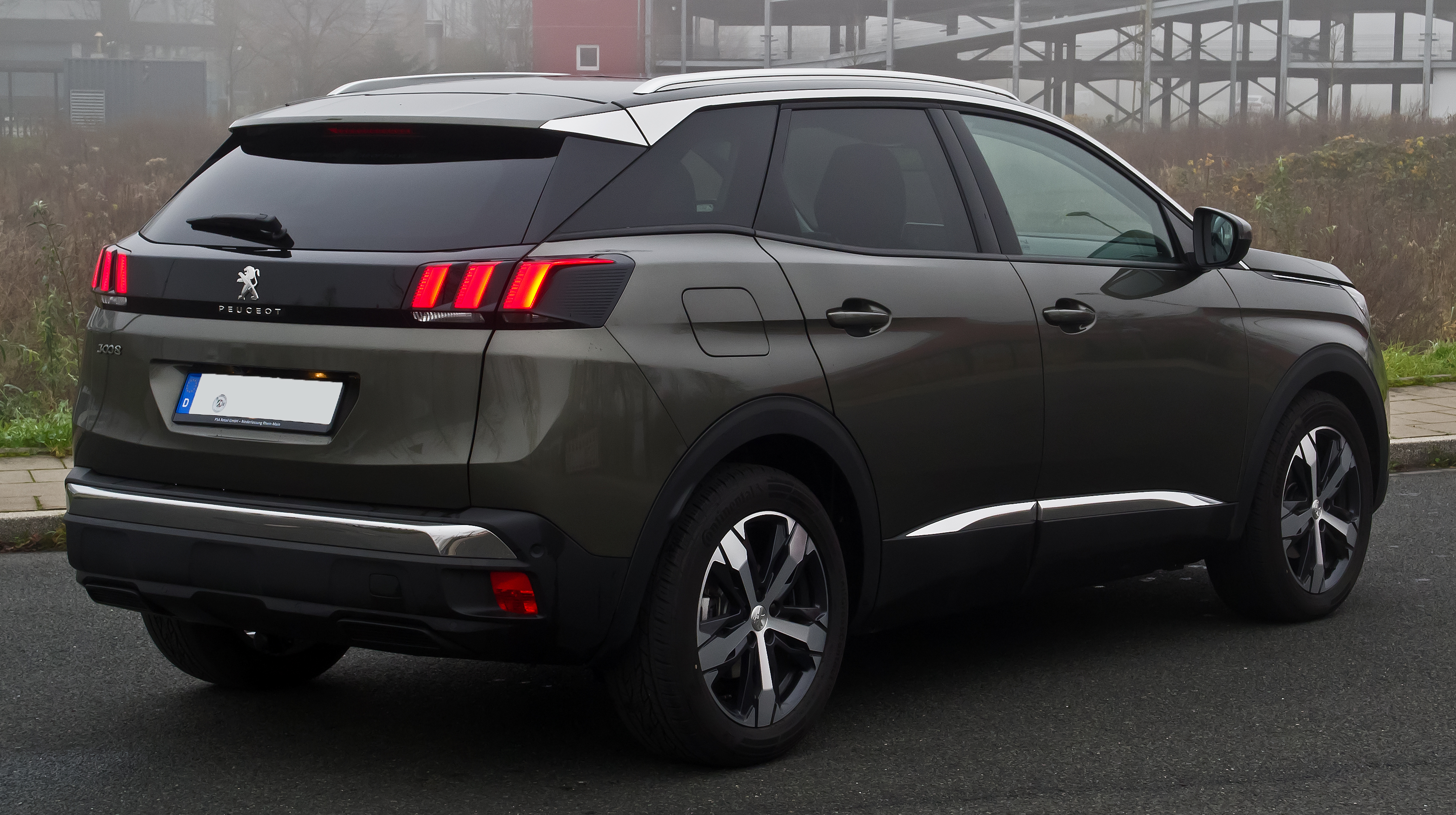 Peugeot 3008 BlueHDi 150 Allure (II)